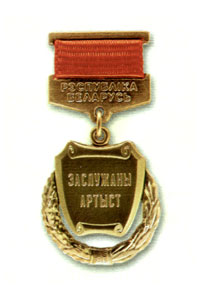 Почётное звание "Заслуженный артист Белоруссии"